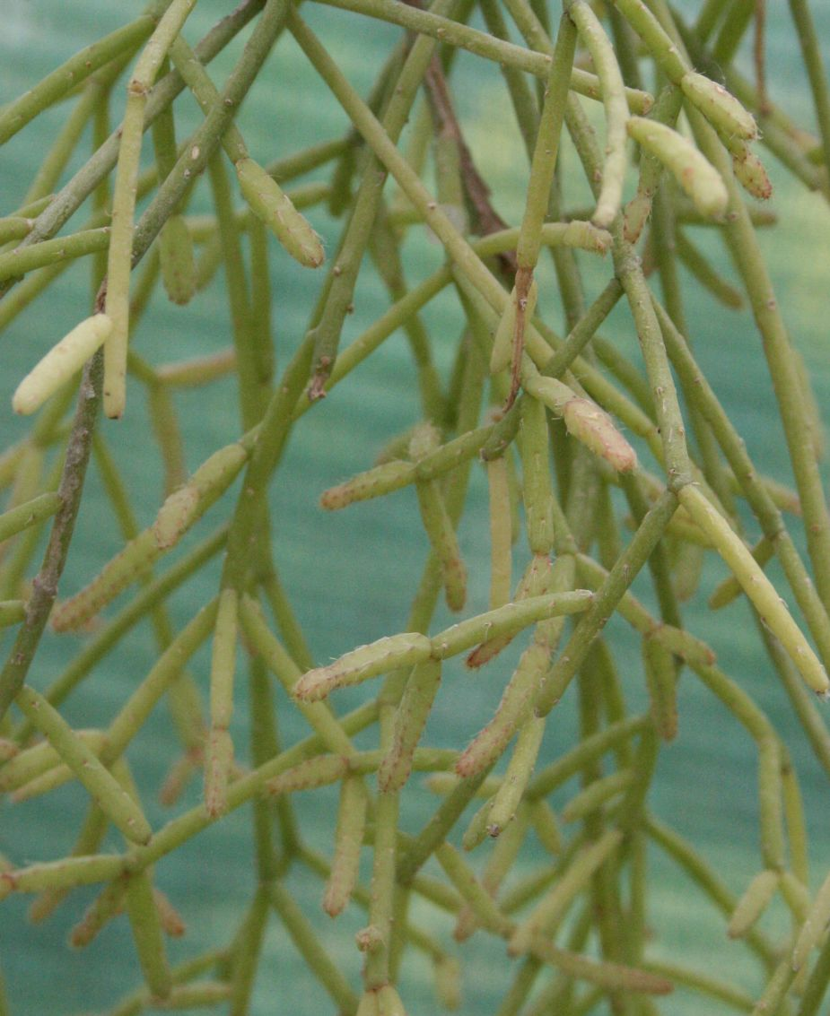 Rhipsalis cereuscula vegetatív hajtása